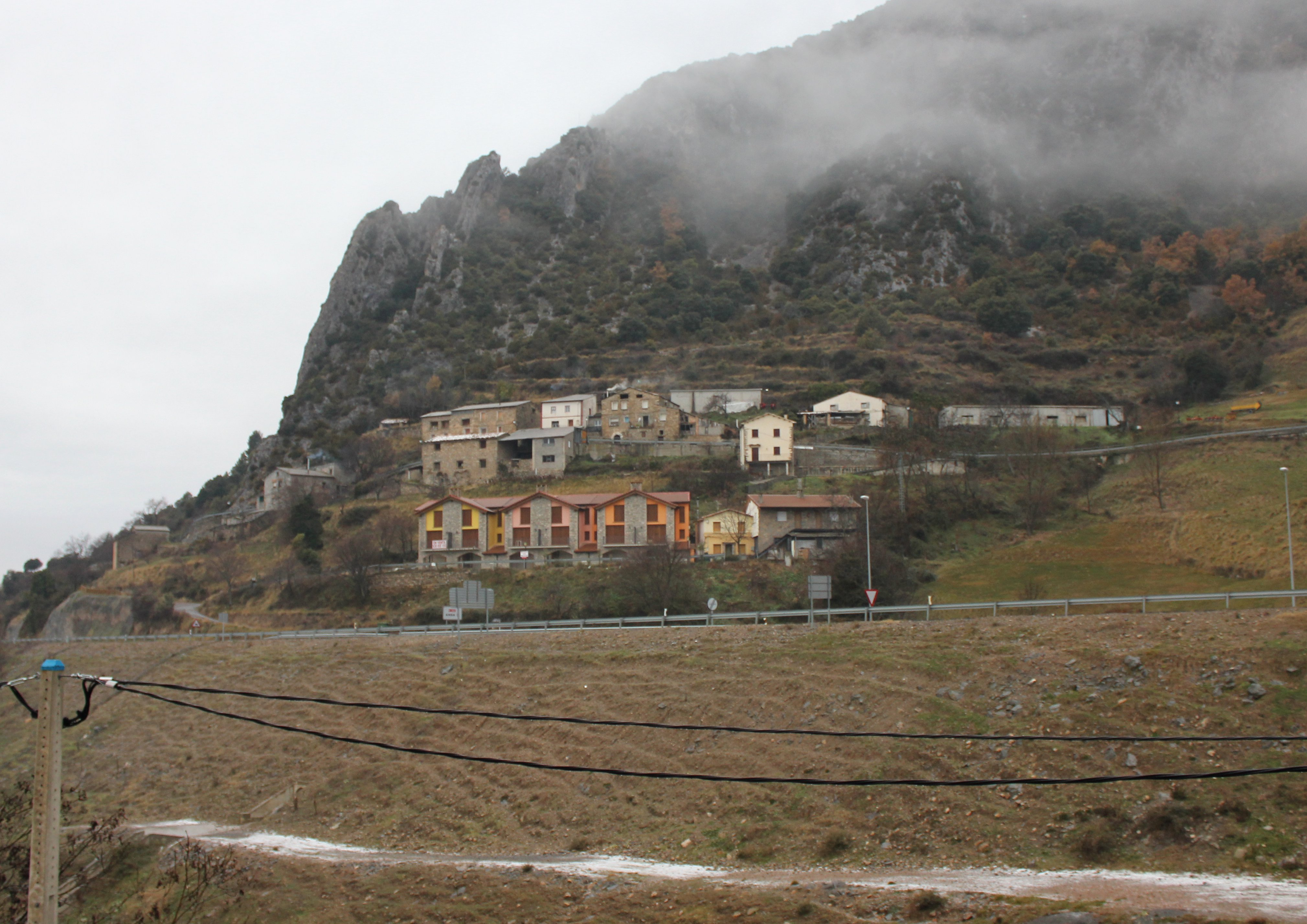 Aragonés: Vico d'a Villa d'Arriba de La Foradada d'el Toscar (Ribagorza).